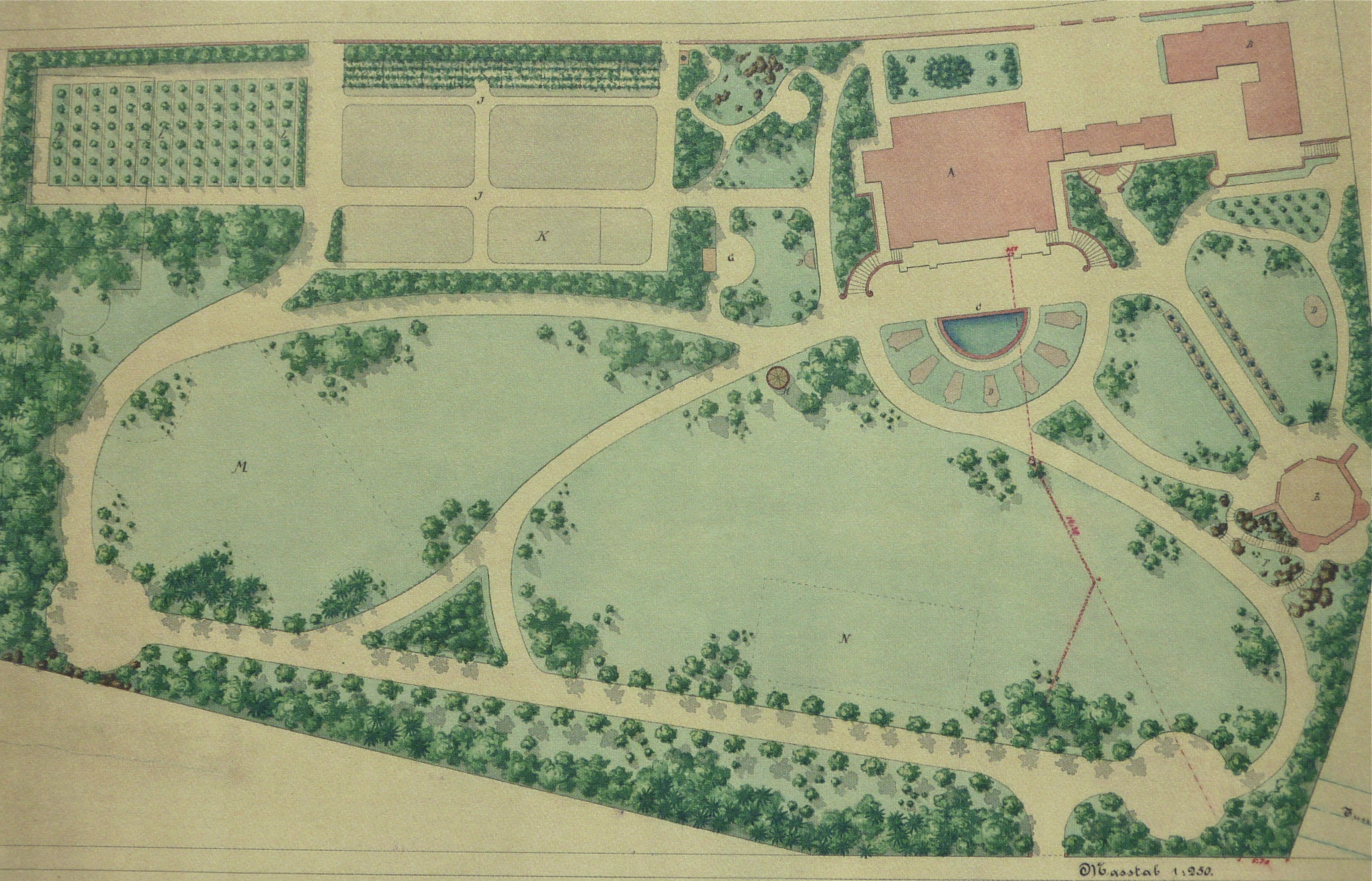 Villa Patumbah Plan der Gartenanlage